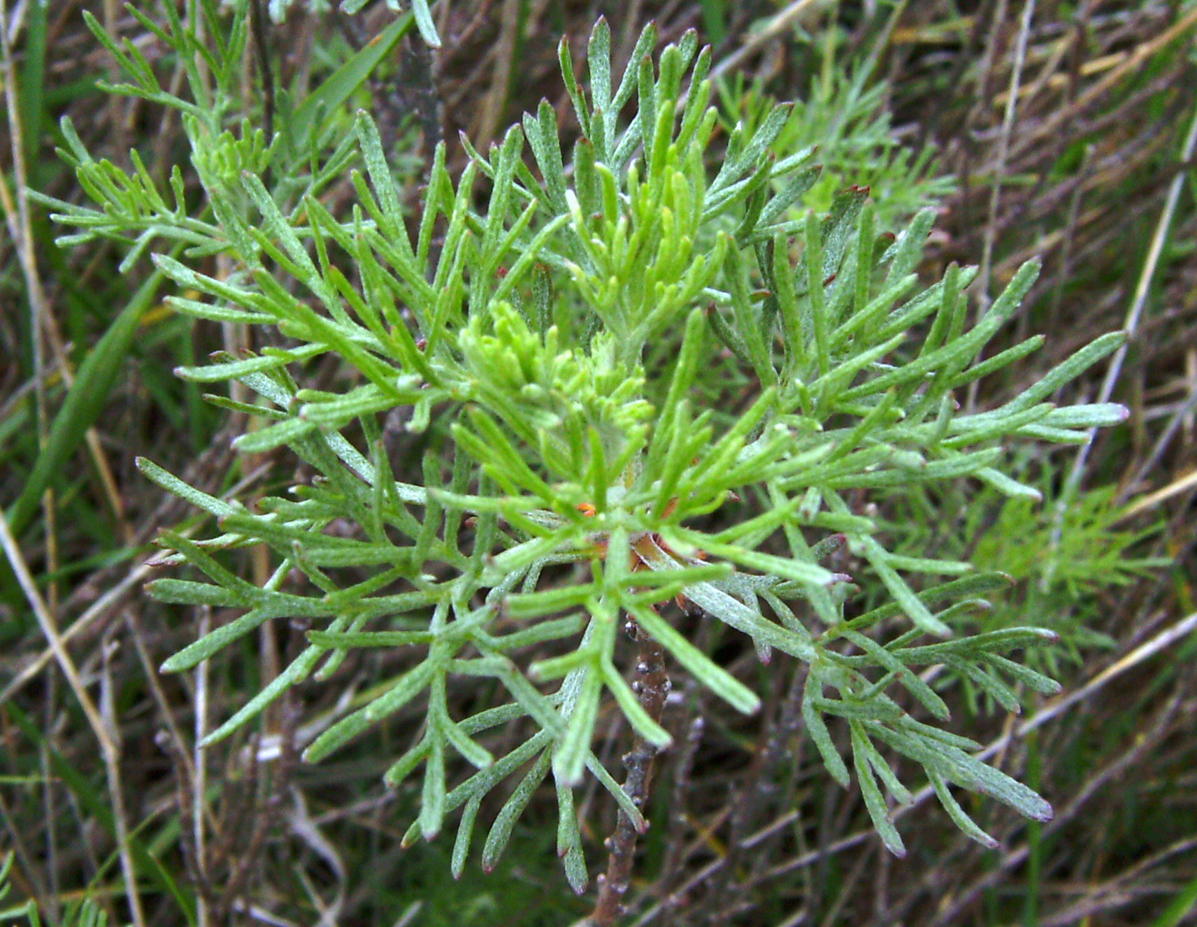 Artemisia campestris in the ild, Castelltallat, Catalonia